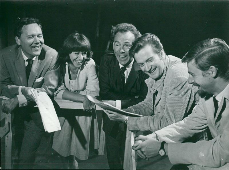 Skådespelarna Olof Thunberg, Gun Arvidsson och Nils Poppe tillsammans med regissören Keve Hjelm och dekoratören Akke Nordwall på Lilla Teatern i Stockholm, i samband med pjäsen Kääärlek. Infört i Svenska Dagbladet 1965-08-19 sid 12.